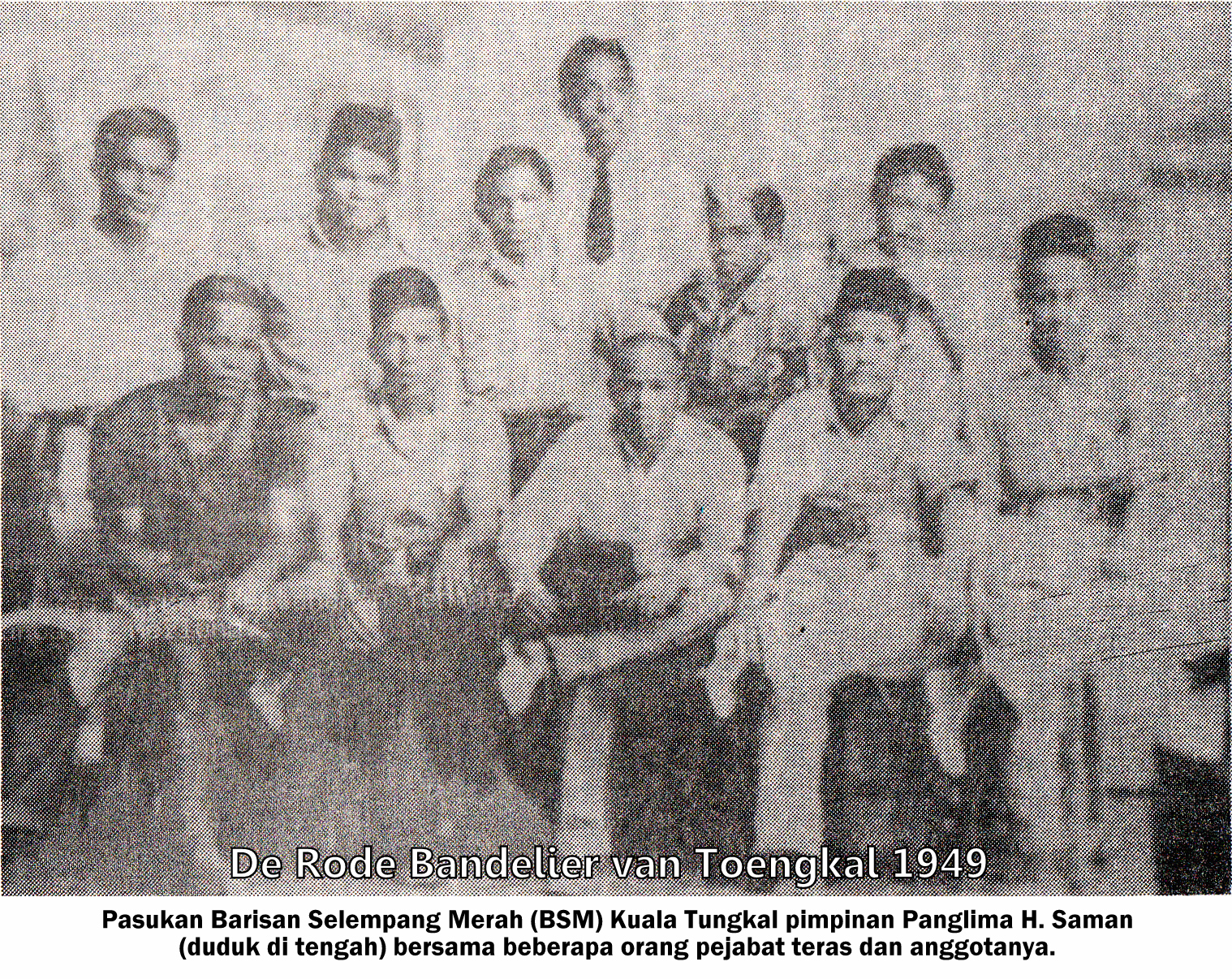 Poto Barisan Selempang Merah Kuala Tungkal